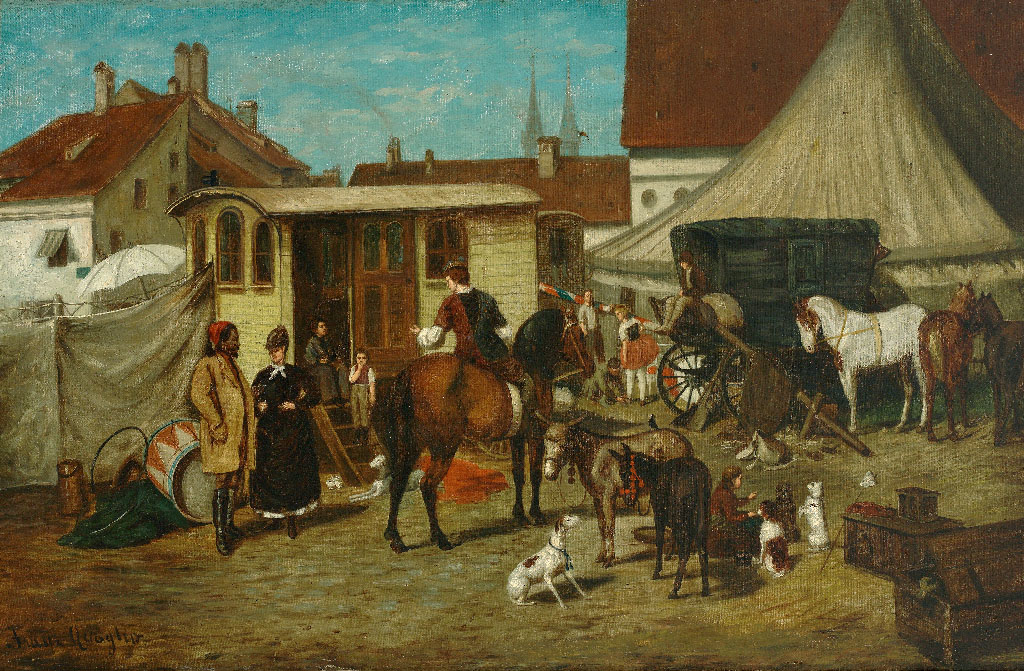 Vor dem Zirkus; Öl auf Leinwand, 56 x 91 cm